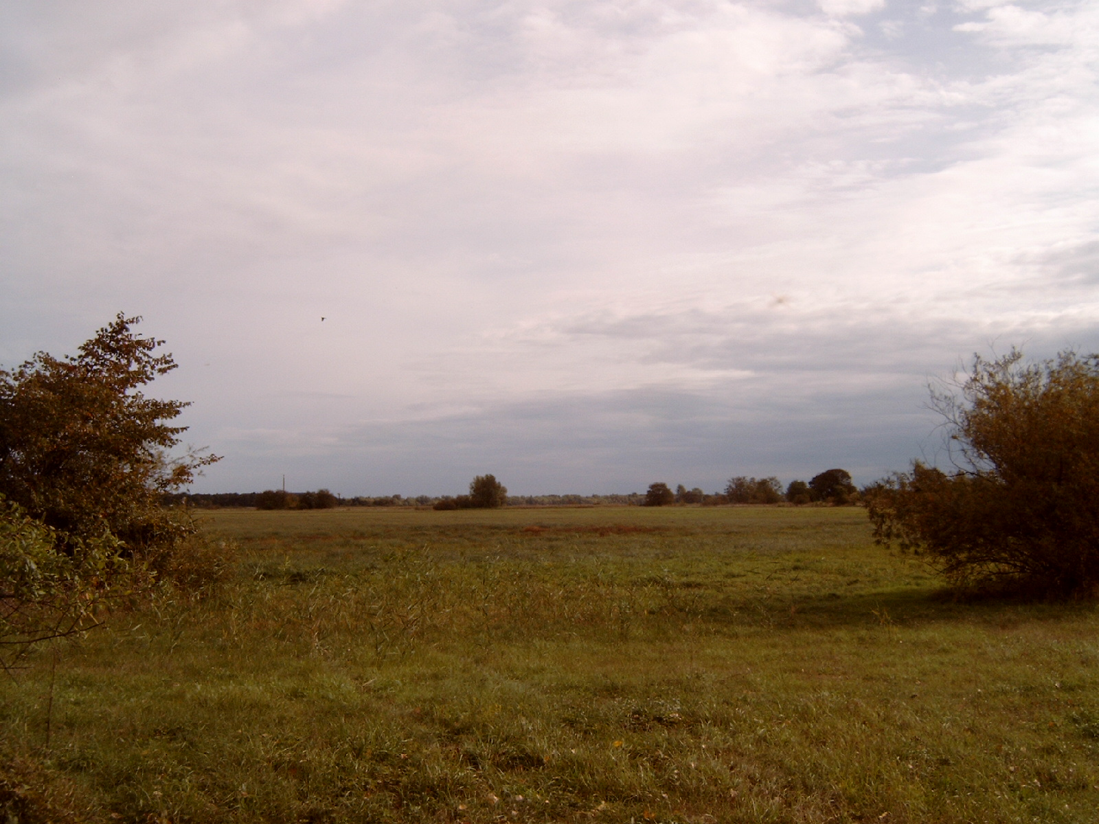 Die Halbinsel Wusterau von Süden gesehen